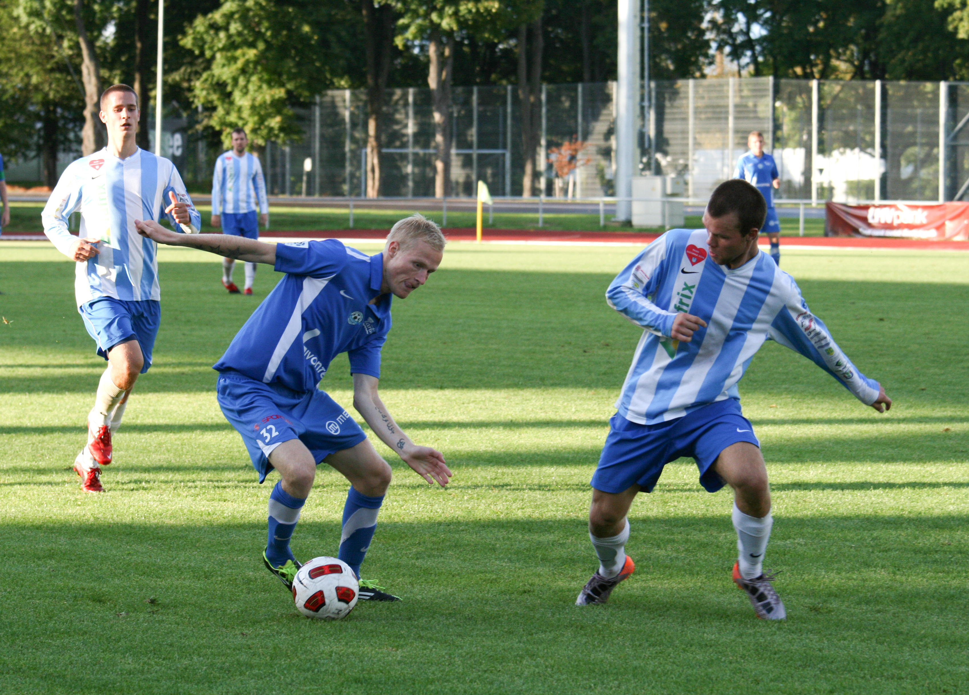 Paide Linnameeskond (kirjus) ja Tartu Tammeka.